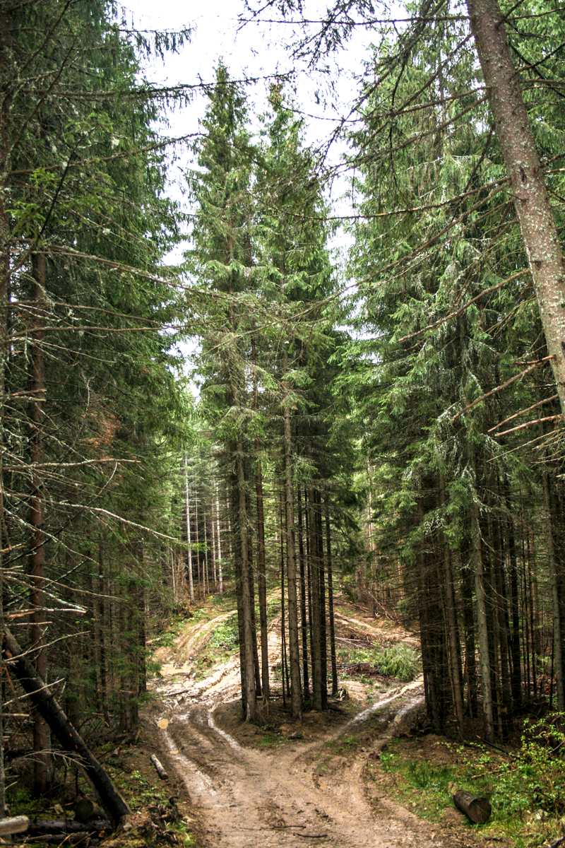 Дорога на лісорозробку.